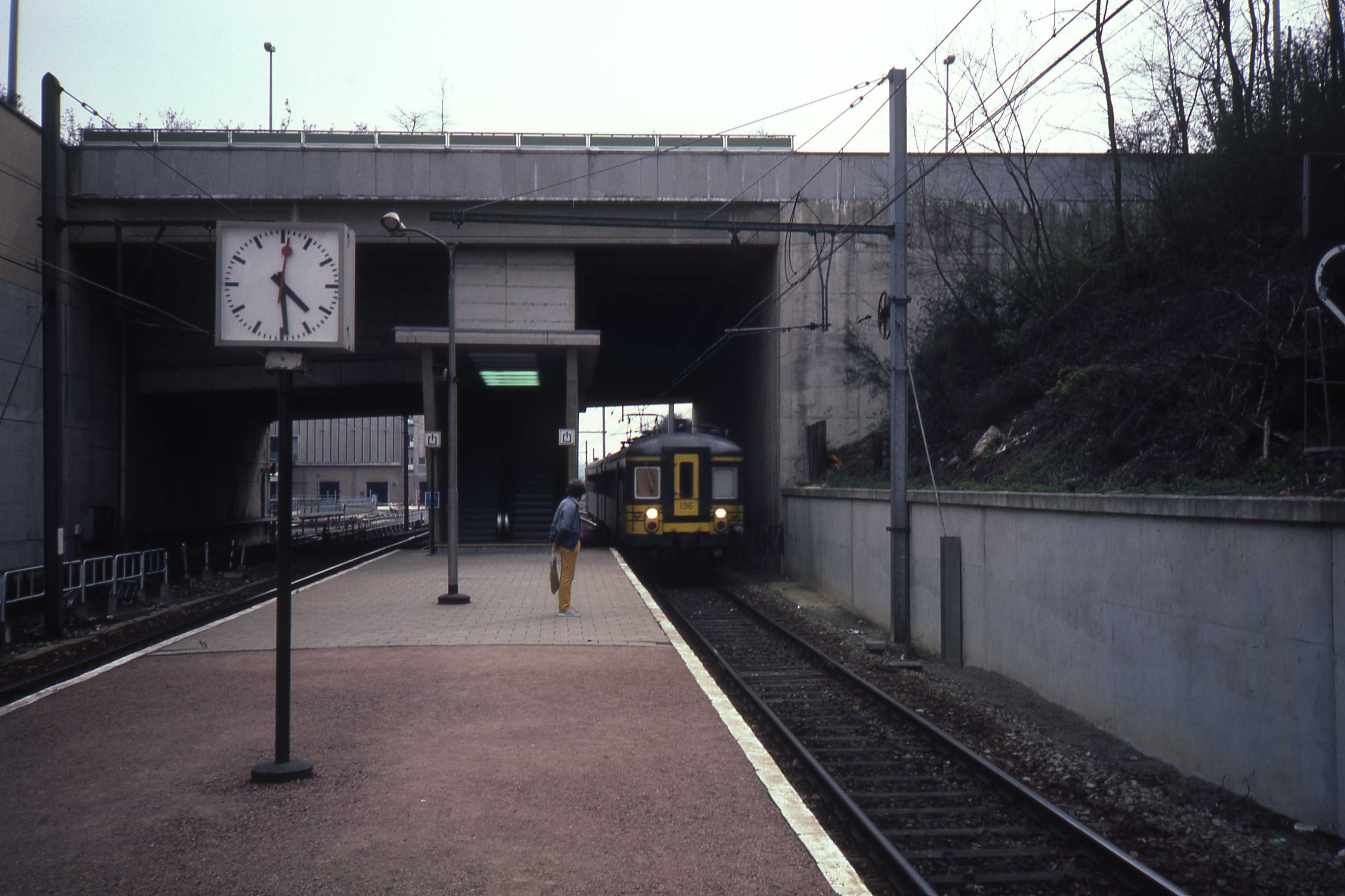 Aankomende stoptrein in Delta